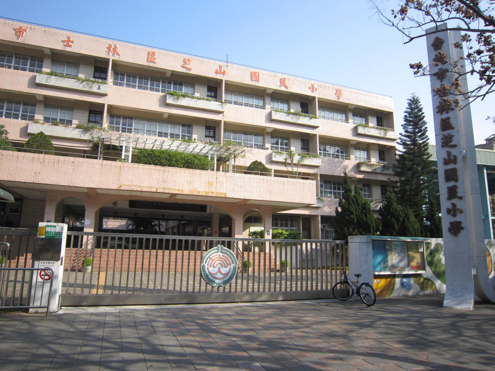 士林區芝山國小 ( 臺北市士林區德行東路285號. 02-28316115 )